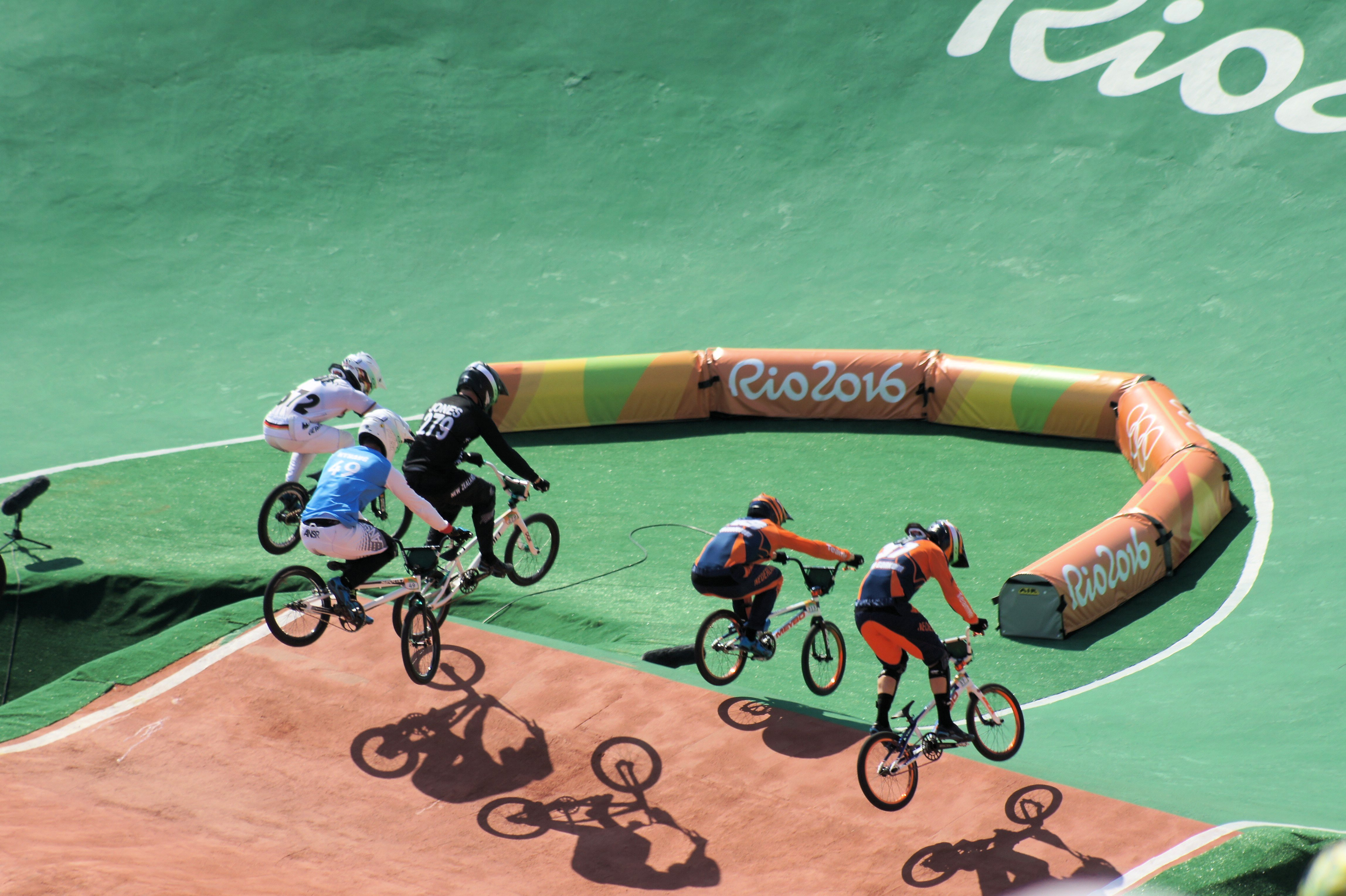 slt.a33